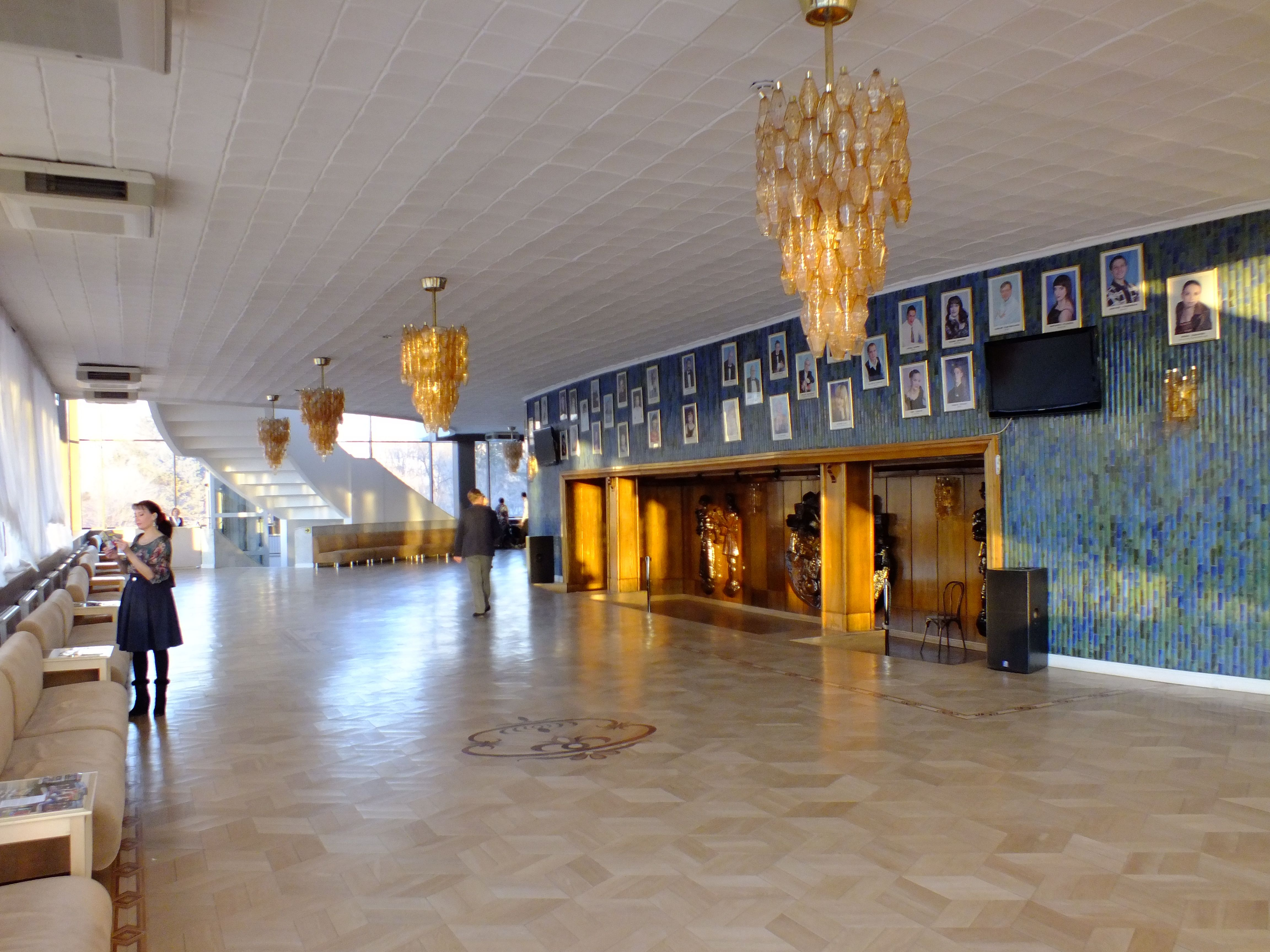 Хабаровский краевой музыкальный театр